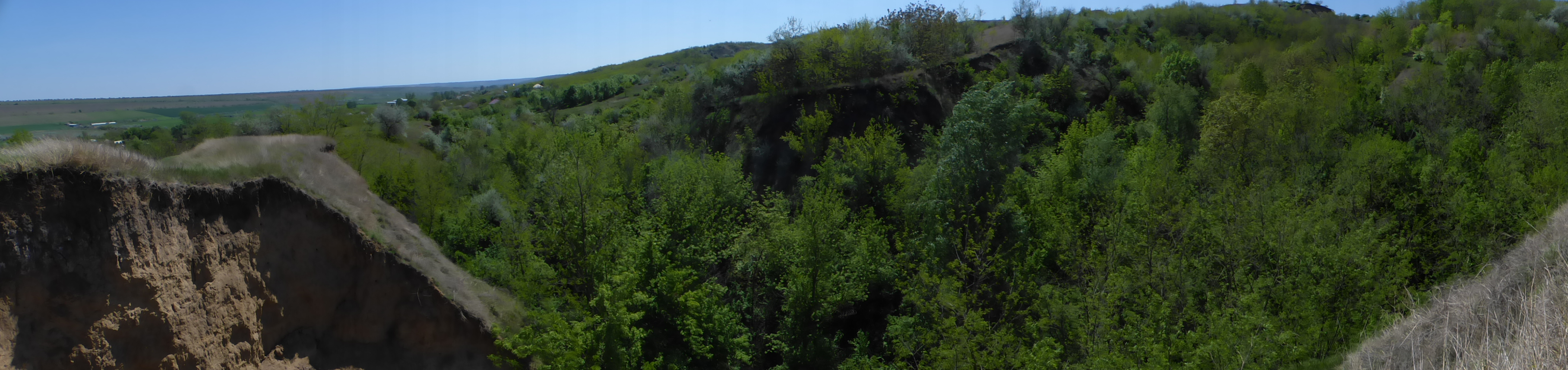 Râpa Musaitu, monument al naturii amplasat în raionul Taraclia, în partea de mijloc a satului Musaitu (cod MD-TR-mn.A-080) A-080